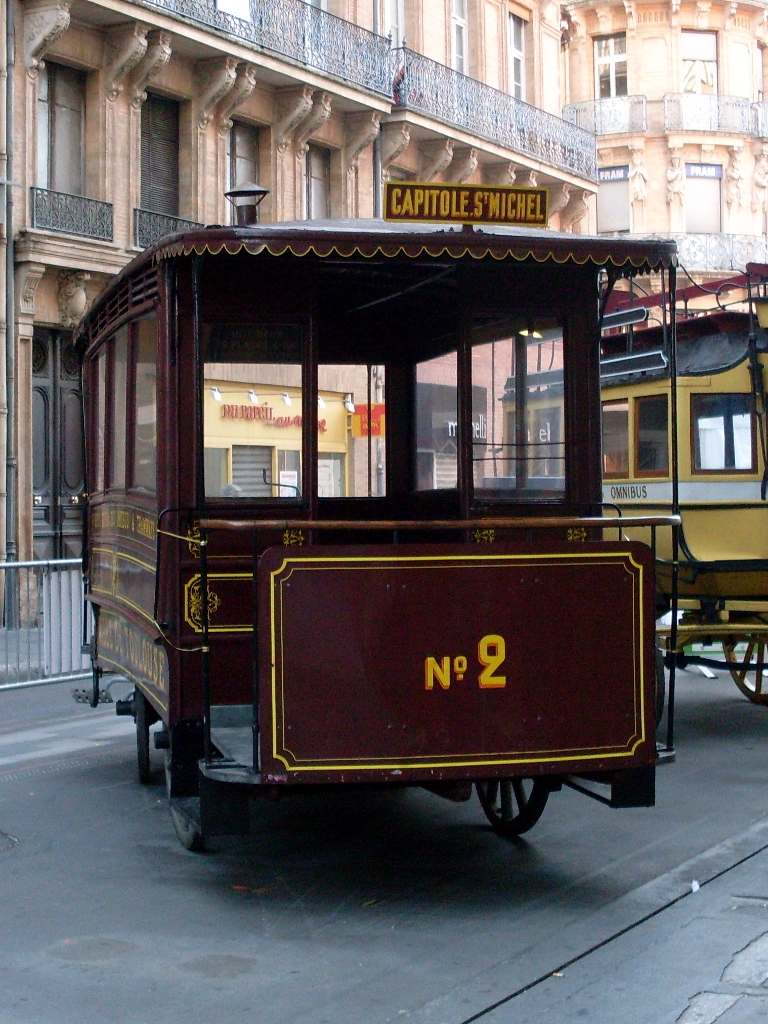 Omnibus Ripert (d’après le nom du constructeur marseillais) de 1881. Il était tiré par des chevaux et avait des banquettes longitudinales de 12 places. Il circulait à Toulouse de 1881 à 1913.